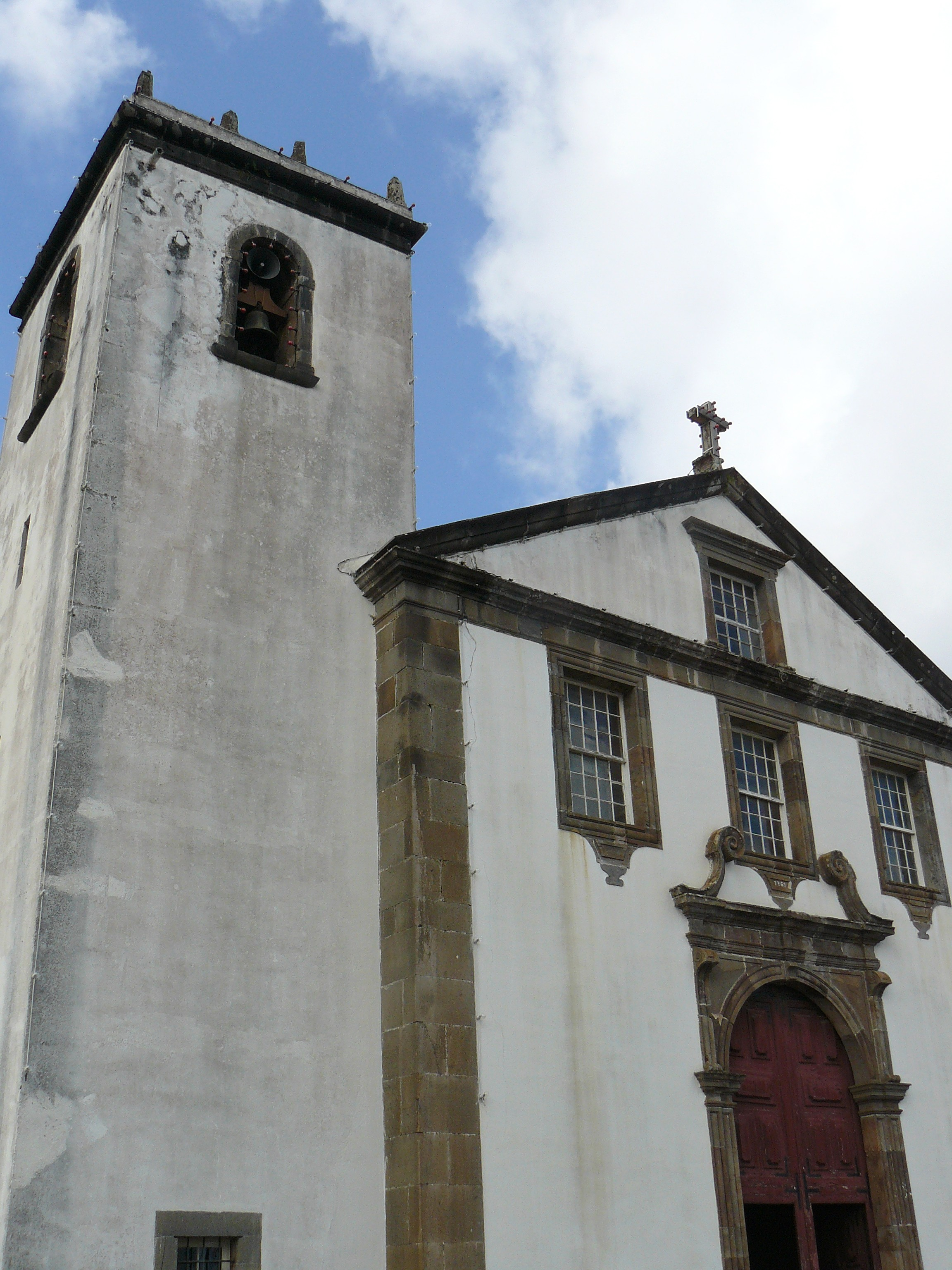 Eglise de São Jorge (Santana, Madère, Portugal)